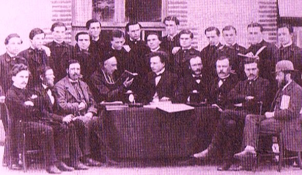 En 1865, une Ecole normale de garçons sous Napoléon III. Assis, les membres du corps enseignant avec le directeur au centre ayant à sa droite l'aumônier lisant son livre de prières. Debout, une promotion d'élèves-maîtres en uniformes noirs à redingotes et gilets.